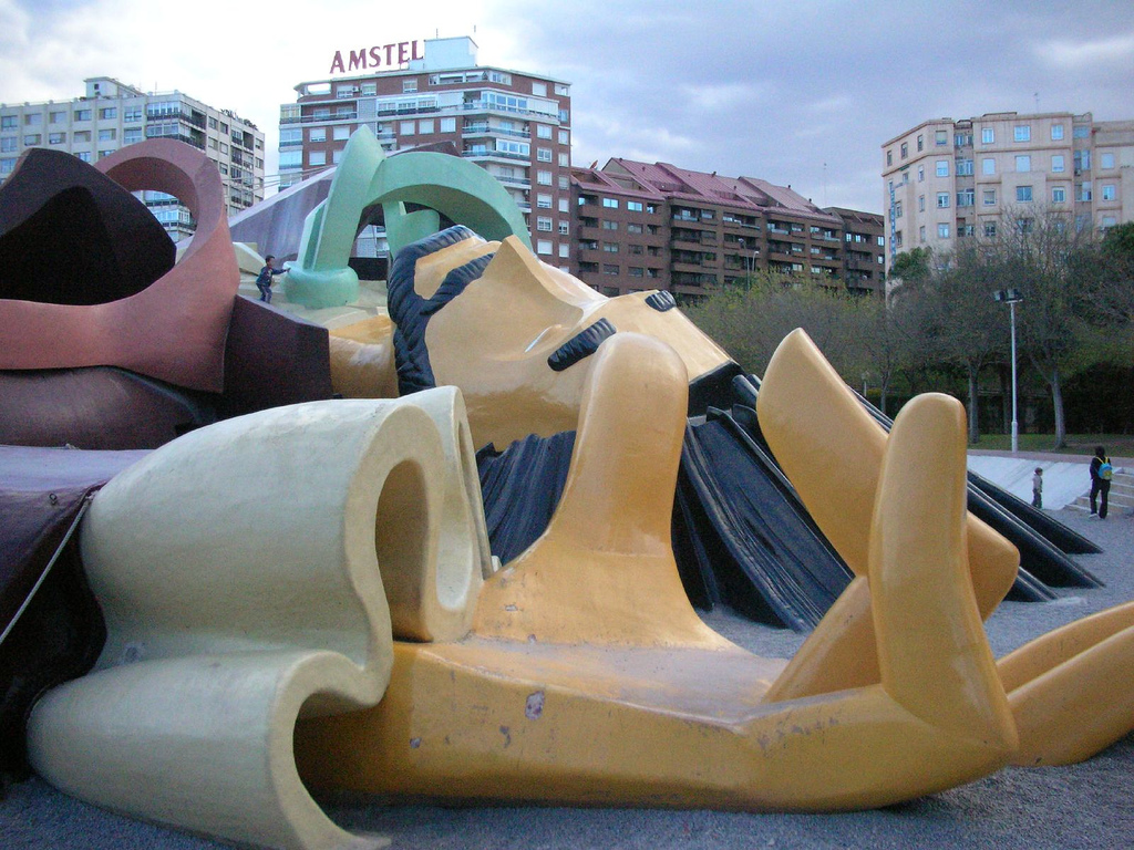 Parque Gulliver (detalle), Valencia, España